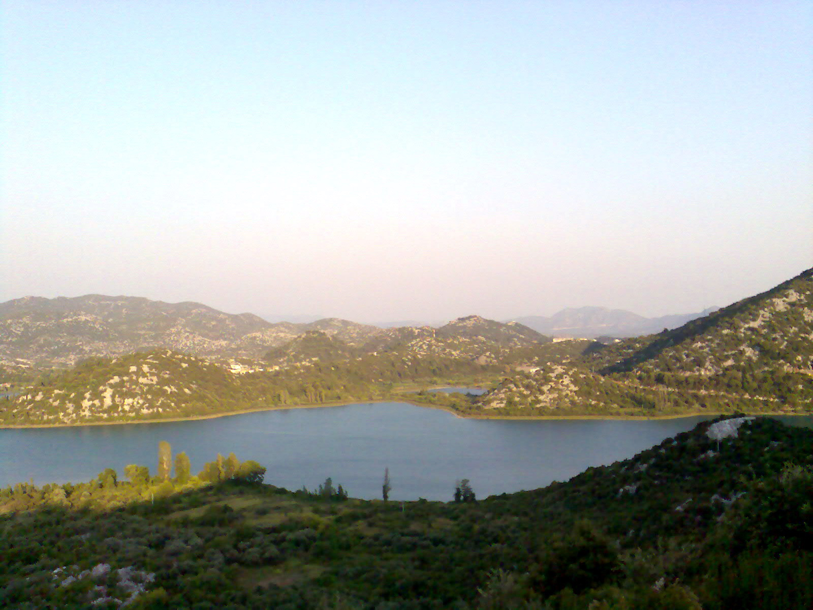 Pogled na Baćinska Jezera s Jadranske Magistrale